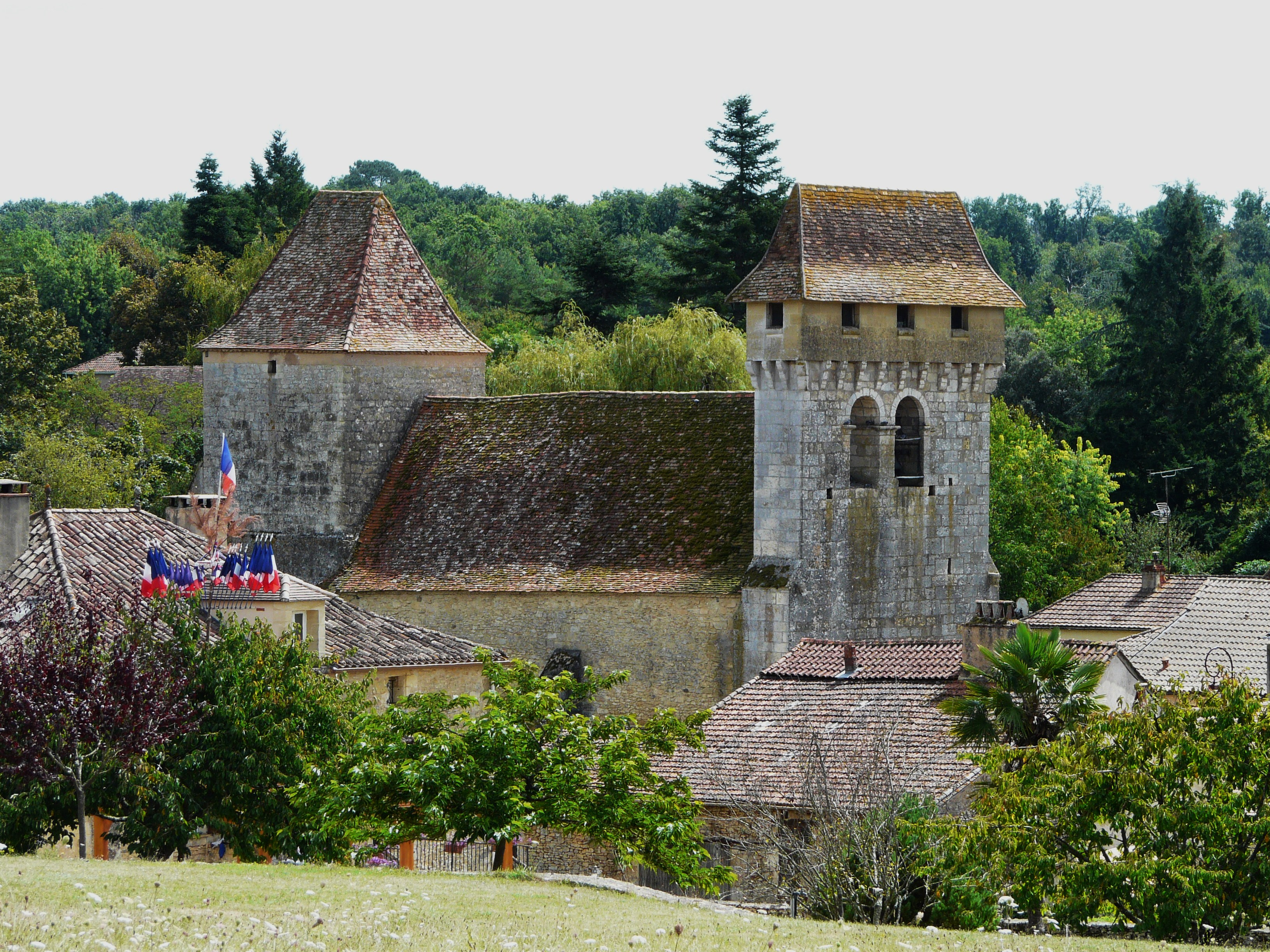 L'église Notre-Dame-de-la-Nativité, Pressignac-Vicq, Dordogne, France.